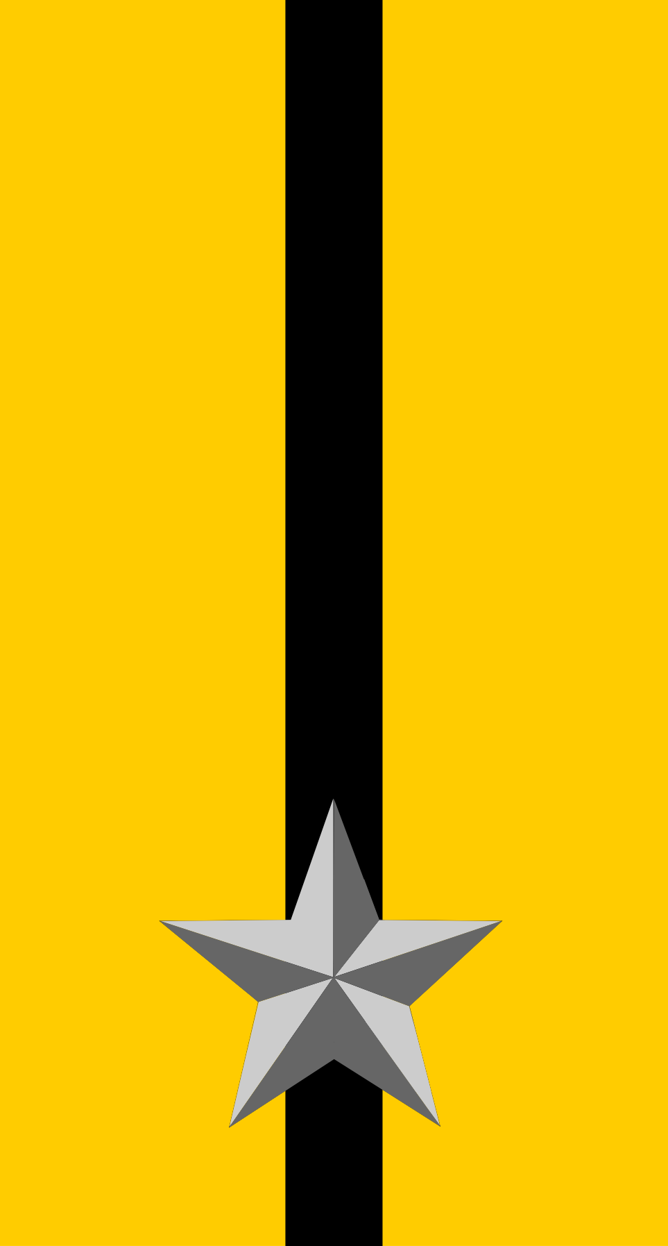 Mostrina della 33ª Divisione fanteria "Acqui" e dell'attuale 17º Reggimento fanteria "Acqui"